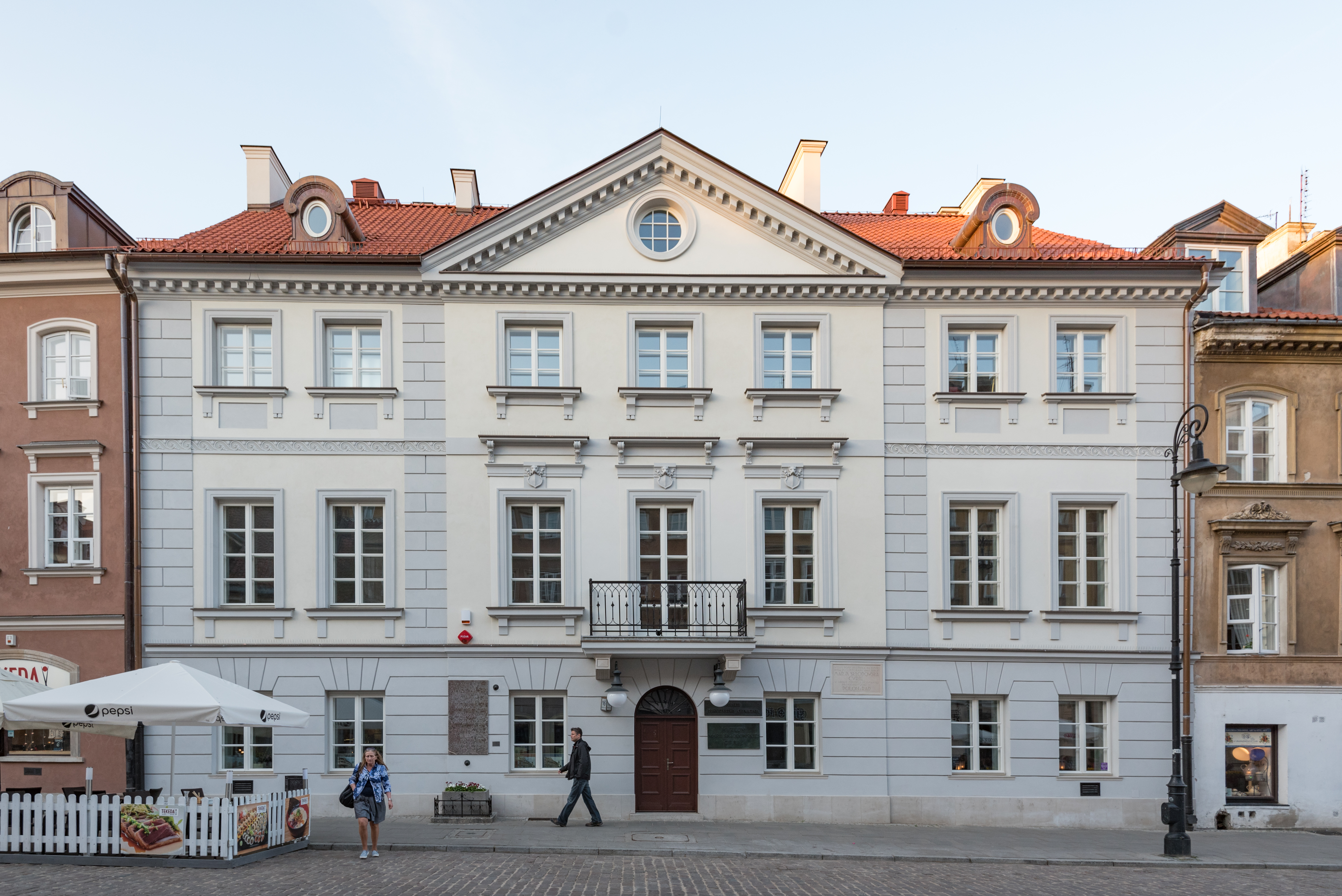 Warszawa, ul. Freta 16